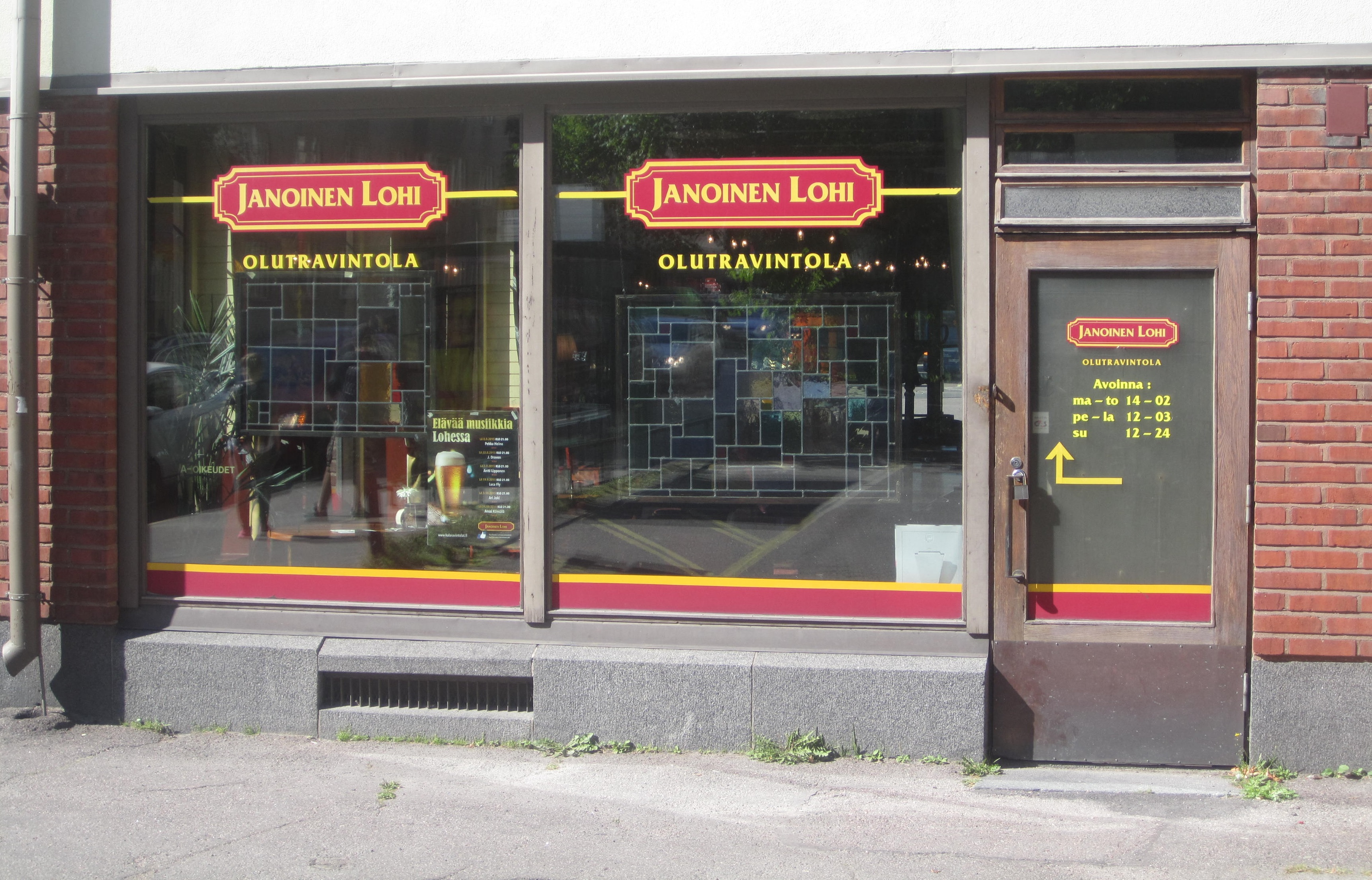 Olutravintola Janoinen Lohi Töölössä, Helsingissä. Osa Kalaravintolat-ketjua.